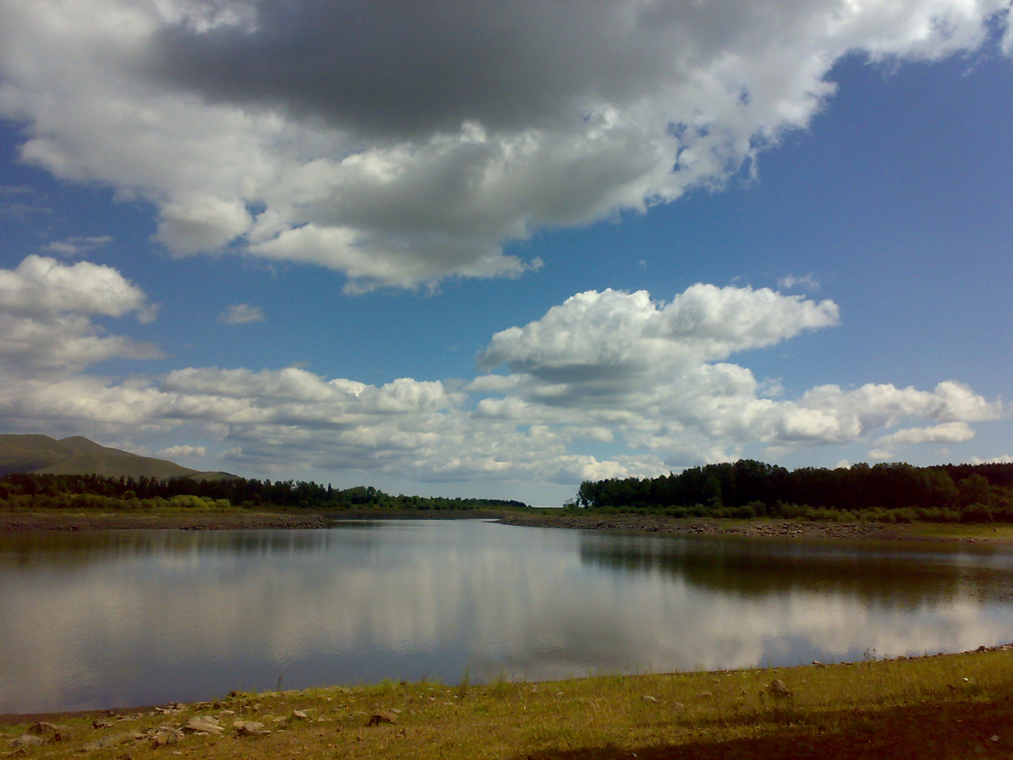 Dmanis rayonun Armutlu kendinin golu